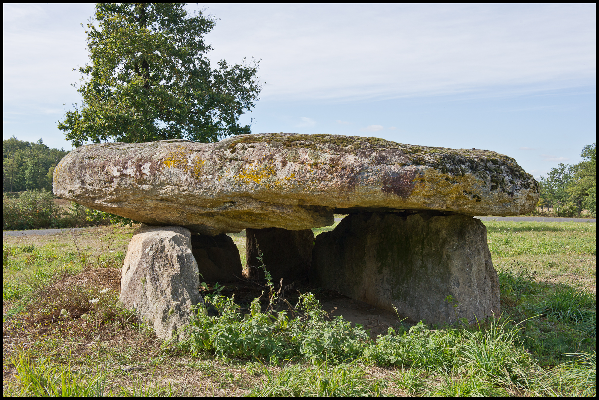 Dolmen de la Betoulle (no 1), La Betoulle (Inscrit, 1984) .